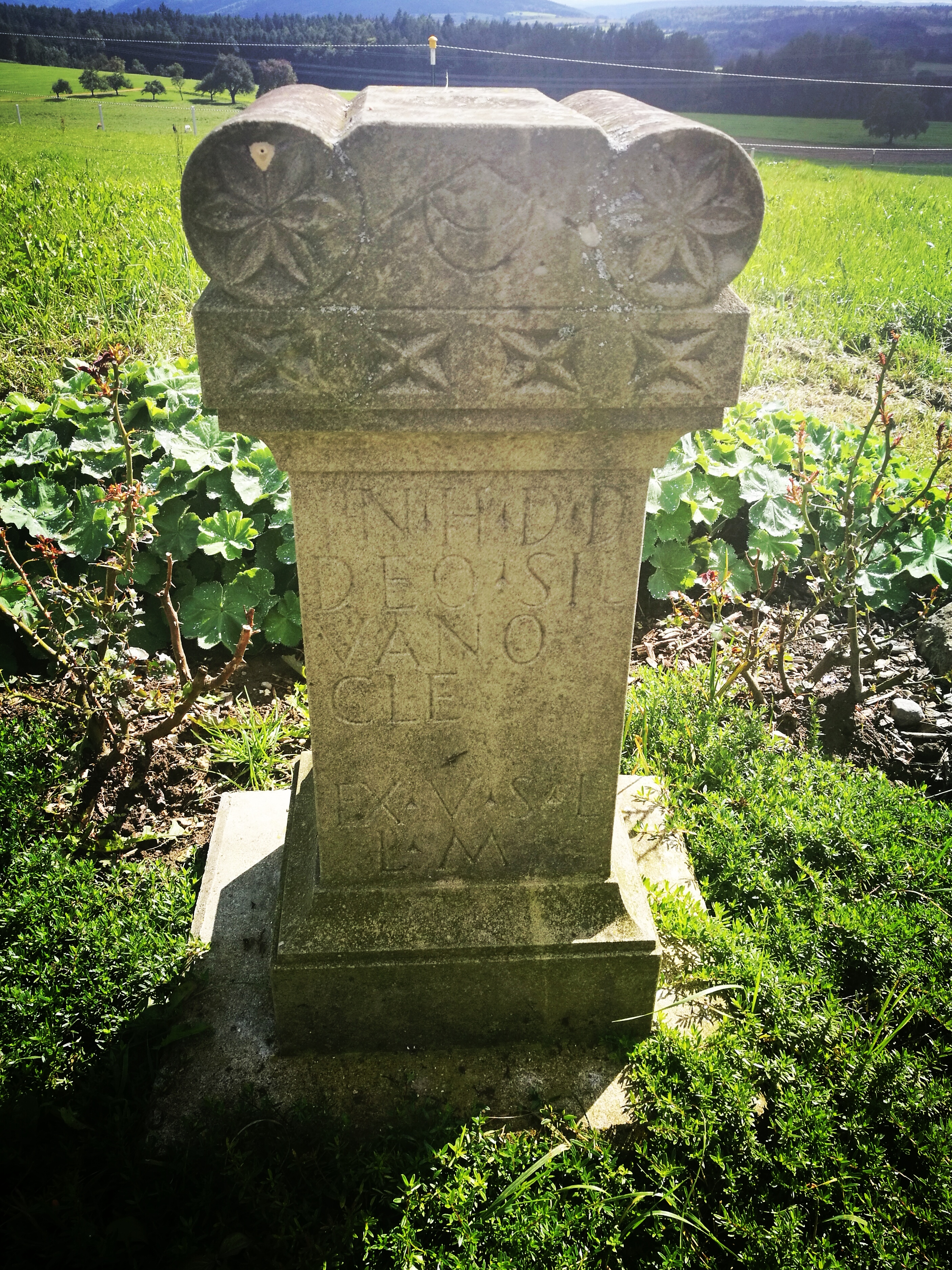 Deutschland (D) - Baden-Württemberg (BW) - Landkreis Konstanz (KN) - Eigeltingen: Römischer Gutshof (Villa rustica), Weihestein 001